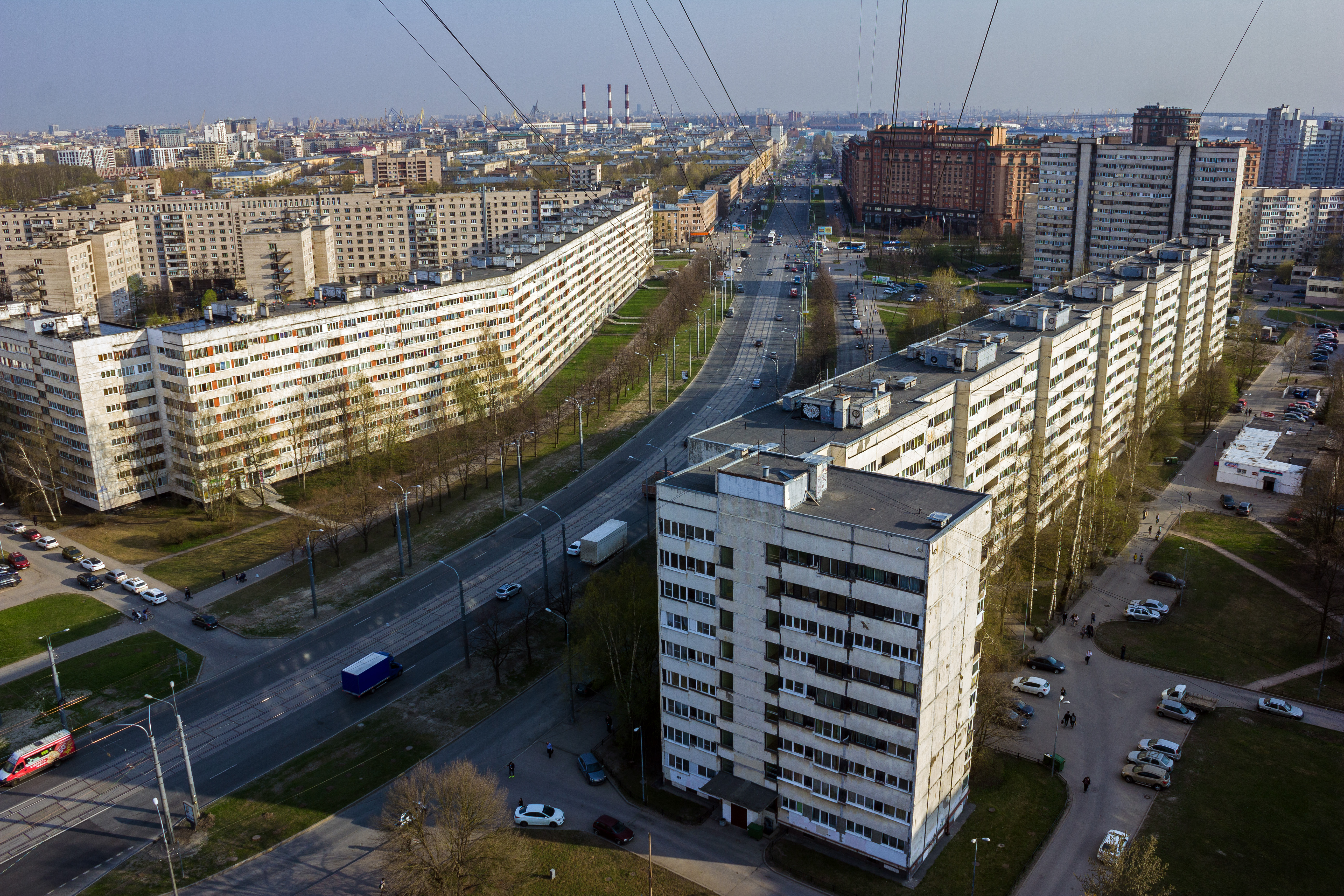 Санкт-Петербург. Улица Наличная